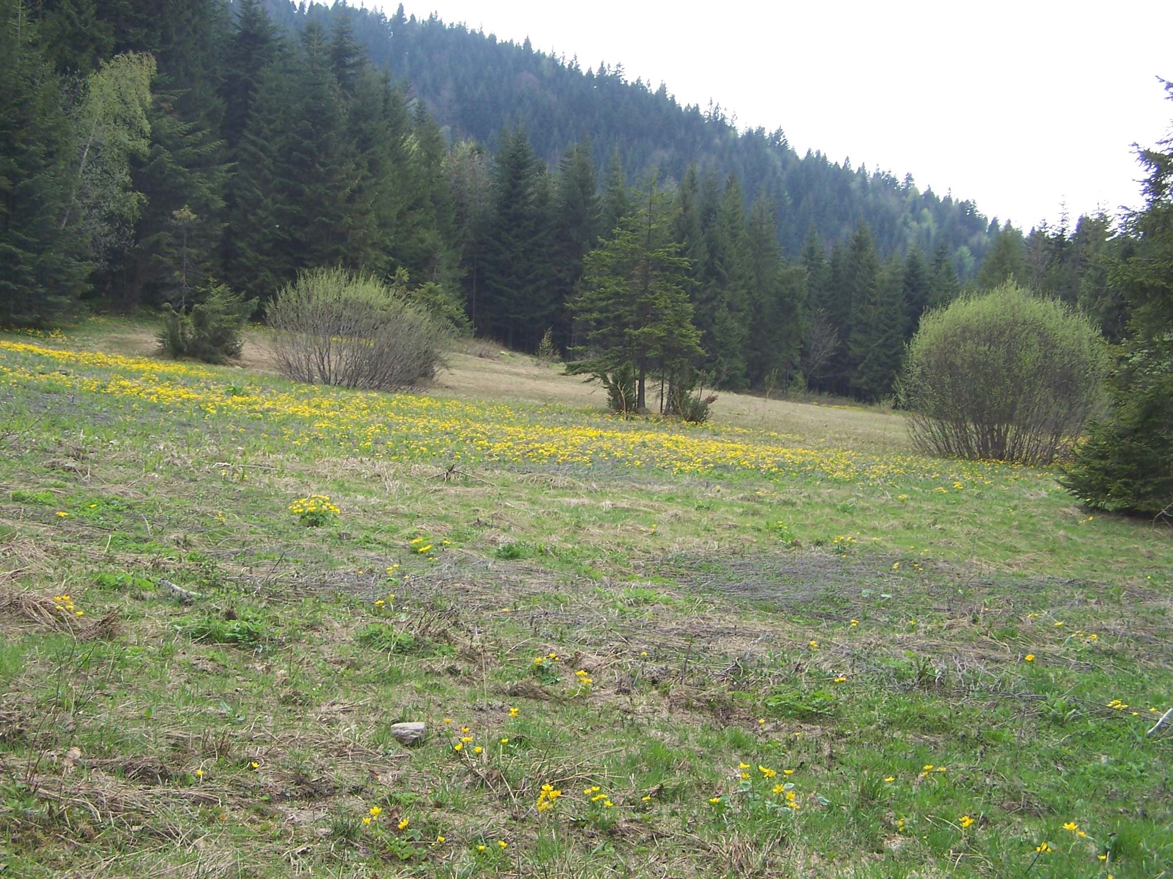 Opis:Polana górska wiosną Data:2006-05-08 Autor:Jerzy Opioła